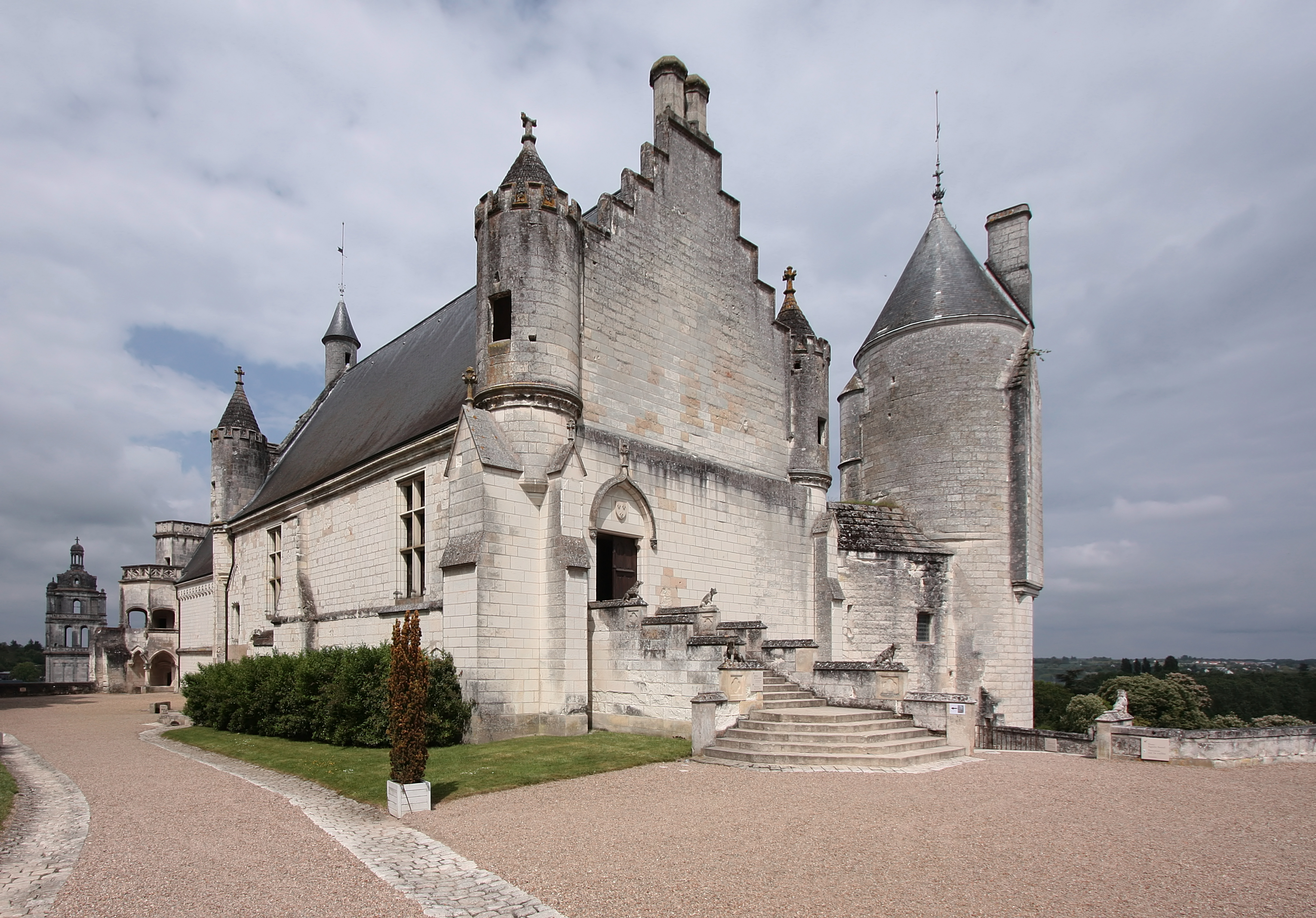 Schloss Loches in Loches/Frankreich - Das Logis Royal, Blick von Südwesten